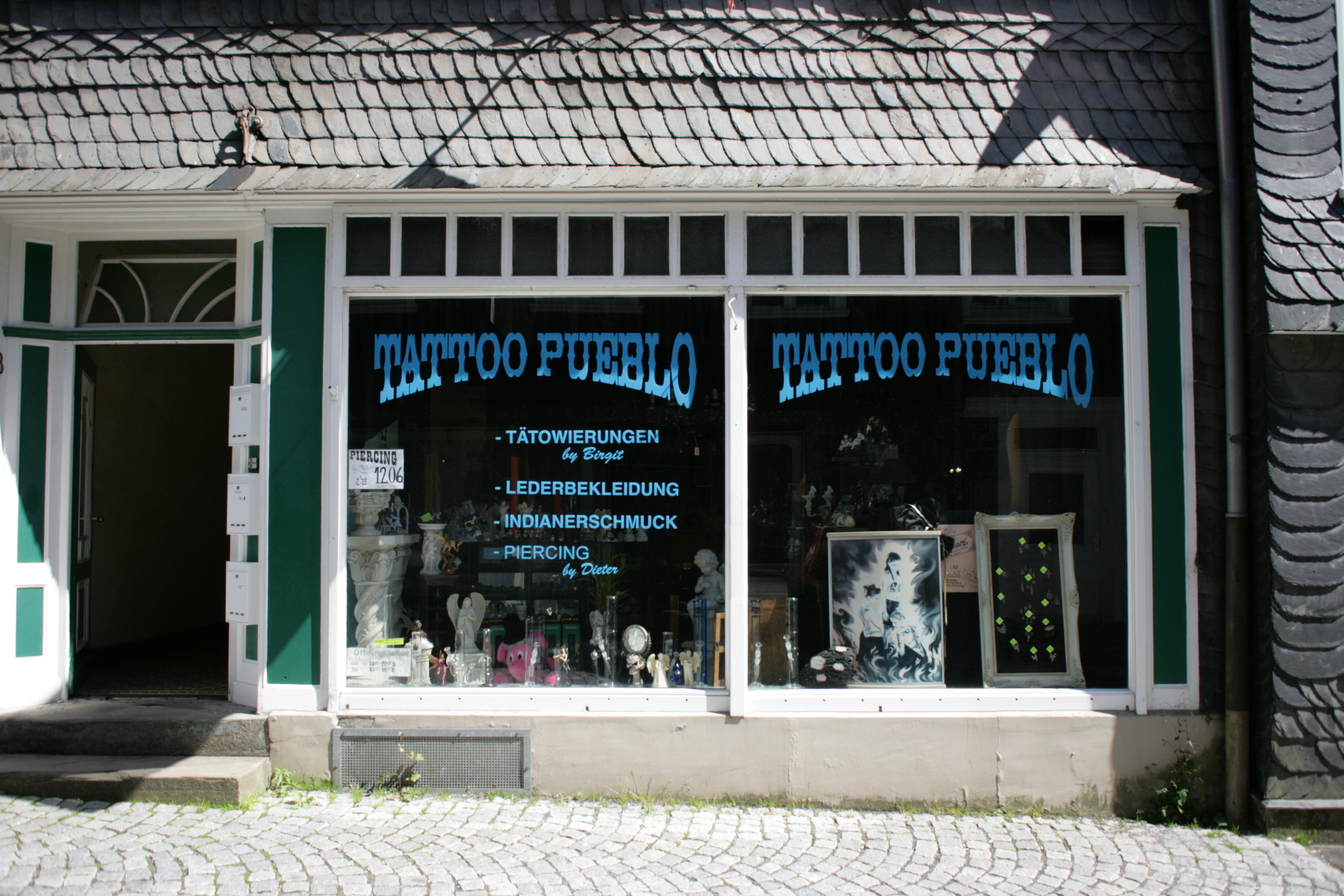 Marktstraße in Hückeswagen